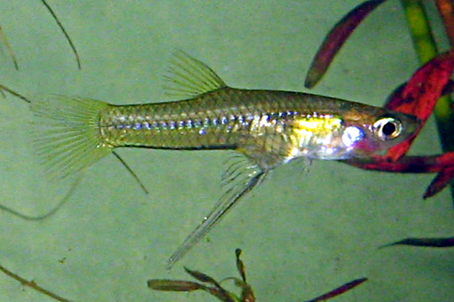 Capturado en Villa Clara